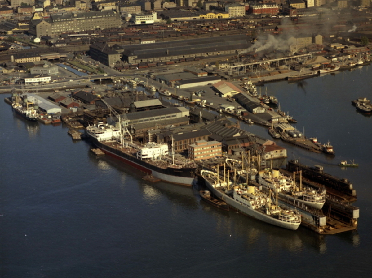 Oslo havn. Skipsverftet Nylands verksted på Paulsenkaia i Bispevika.